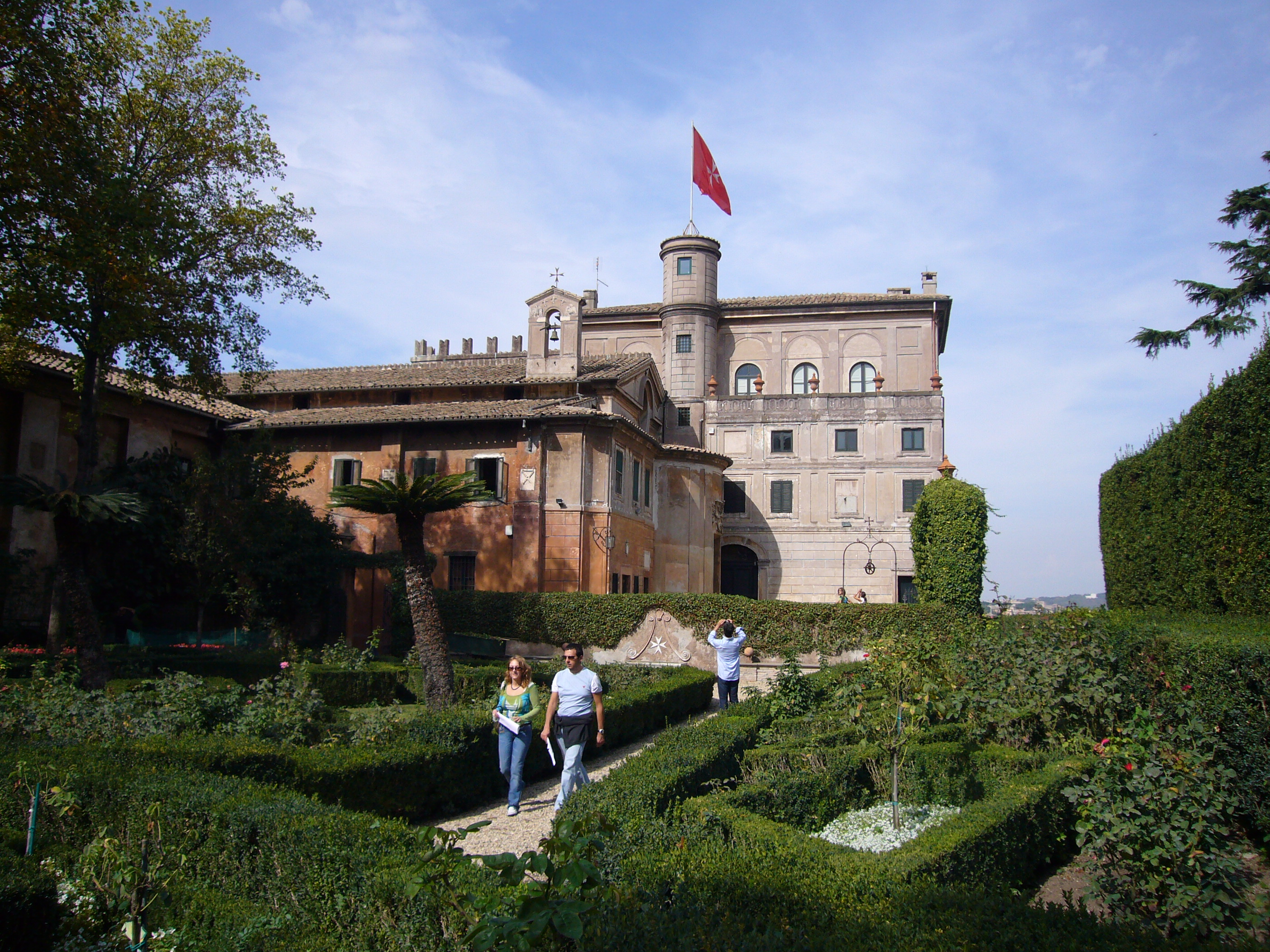 Roma, Villa del Priorato dei Cavalieri di Malta: vista dal giardino